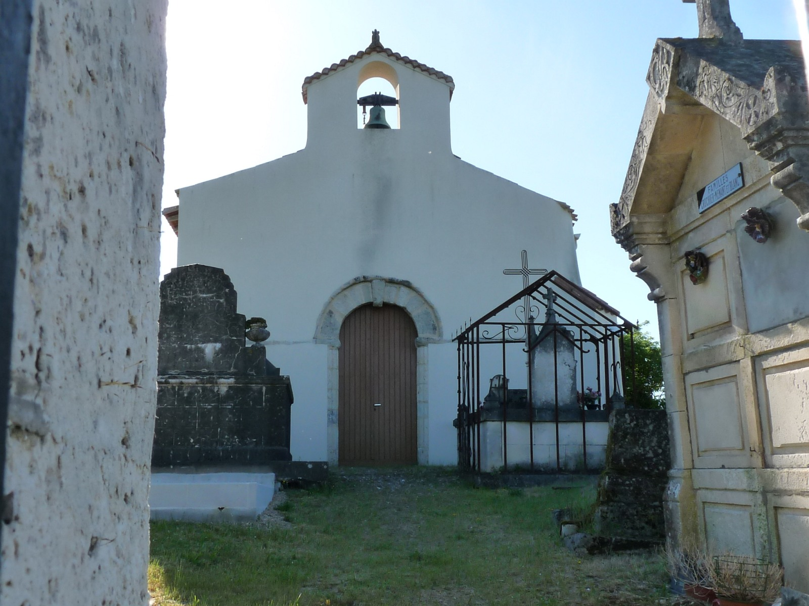 Chapelle de Cressac, La Genétouze, Charente-Maritime, France